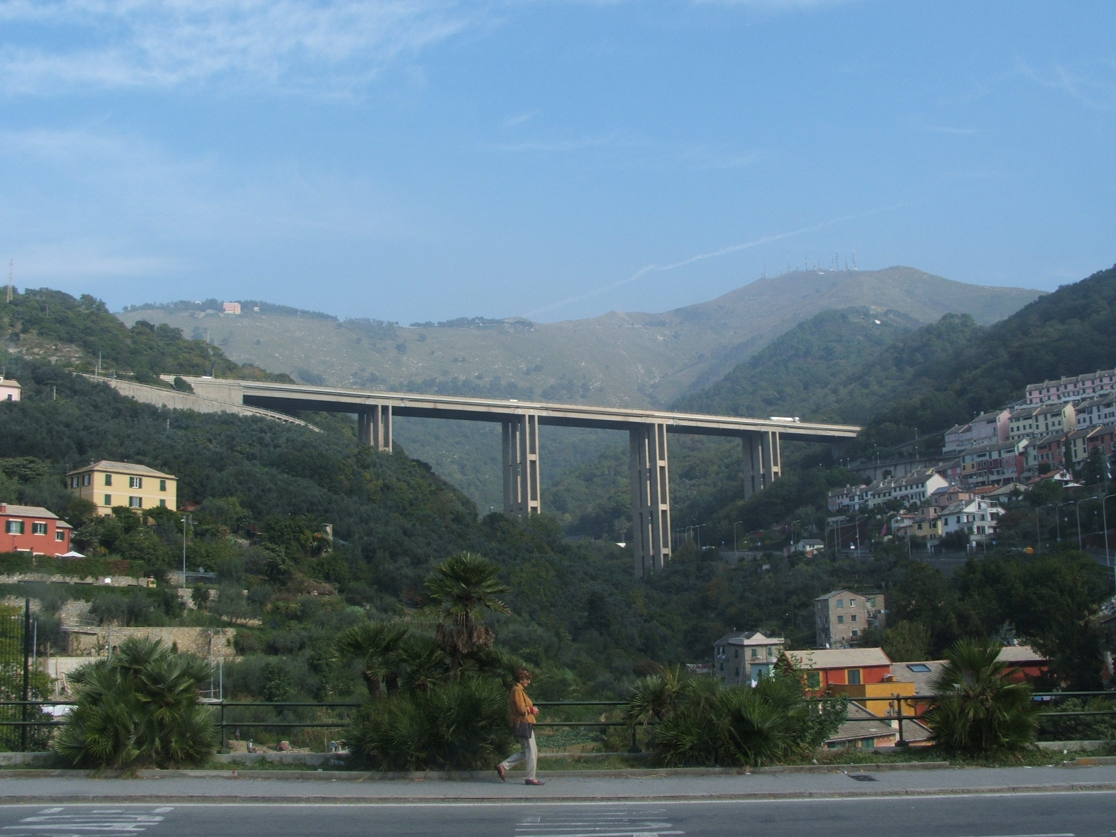 Immagine dalla città di Genova Corso Europa - il viadotto autostradale "Bagnara" sull'autostrada A12 all'altezza di Quinto al mare, poco prima di Nervi (quartiere di Genova)